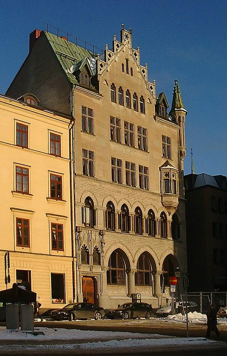 Facade at Munkbron in Gamla stan.